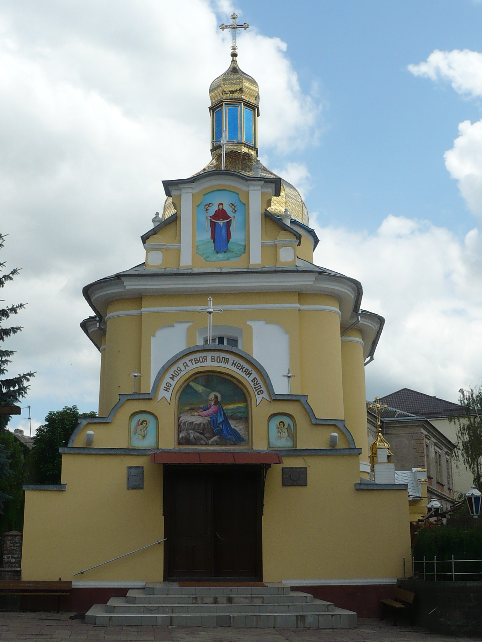 Buczacz. Cerkiew Opieki Matki Boskiej